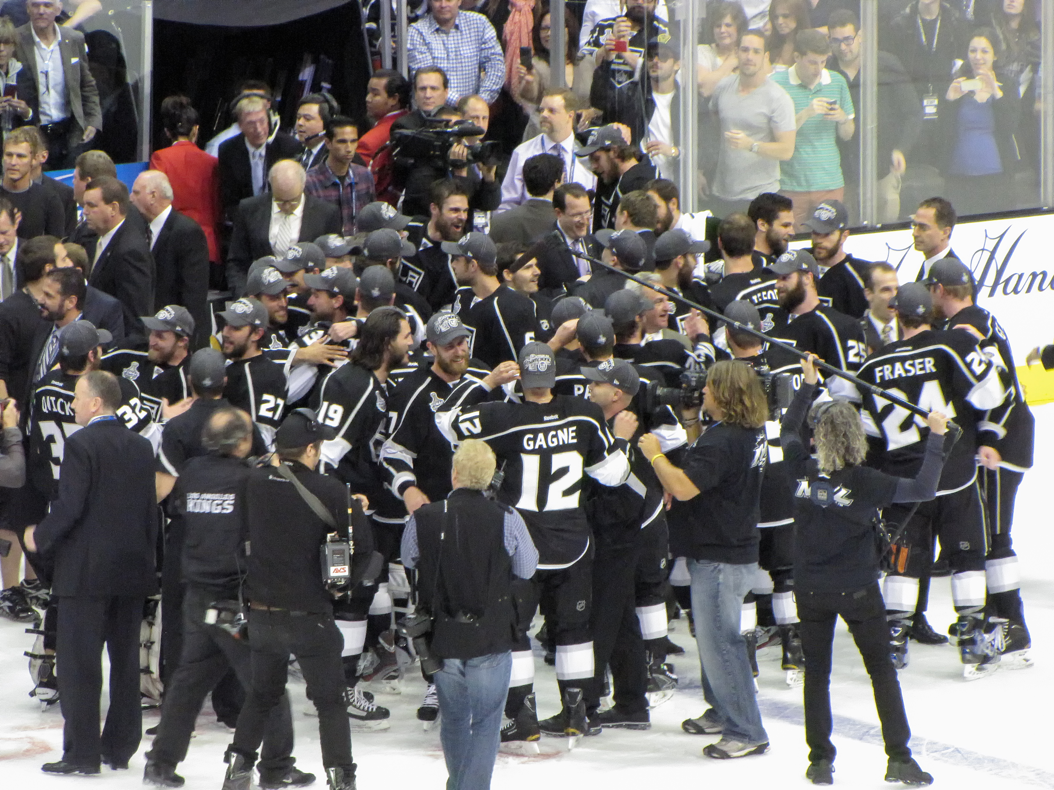 Los Angeles Kings